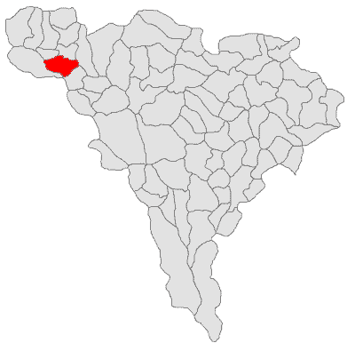 Categorie:Hărţi ale judeţului Alba